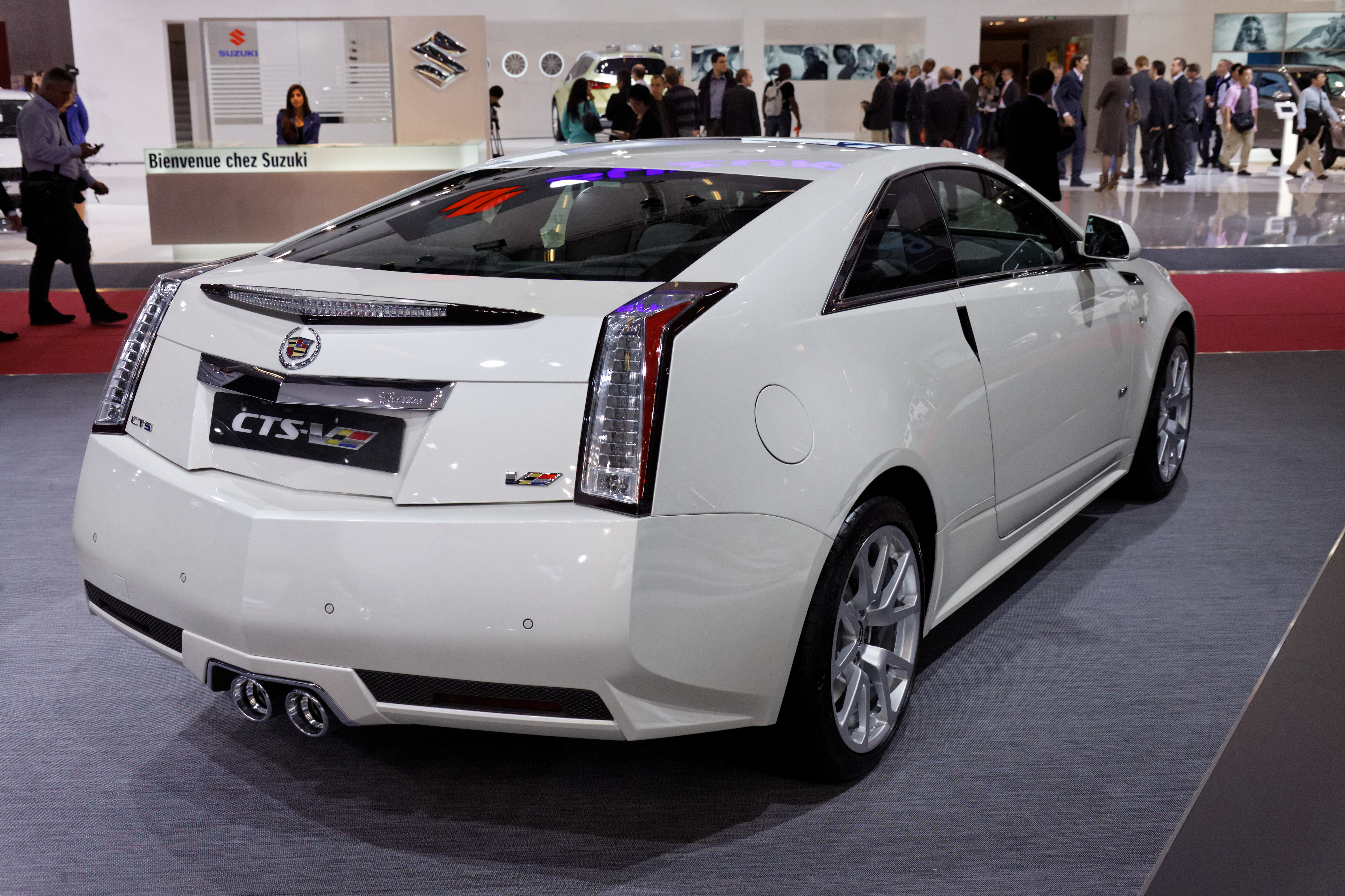 Une Cadillac CTS-V présentée lors du Mondial de l'Automobile de Paris 2012.